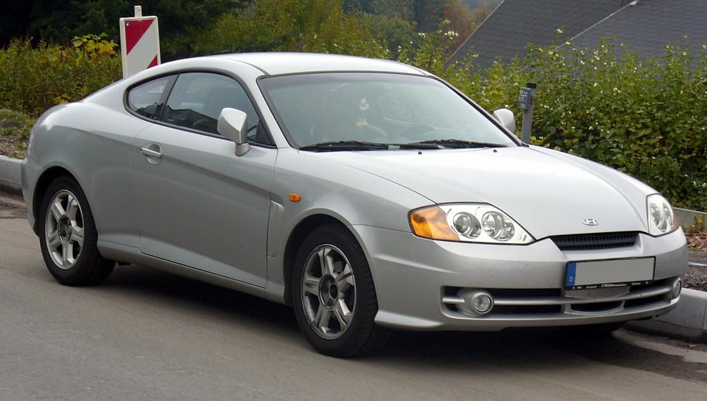 Hyundai Coupé